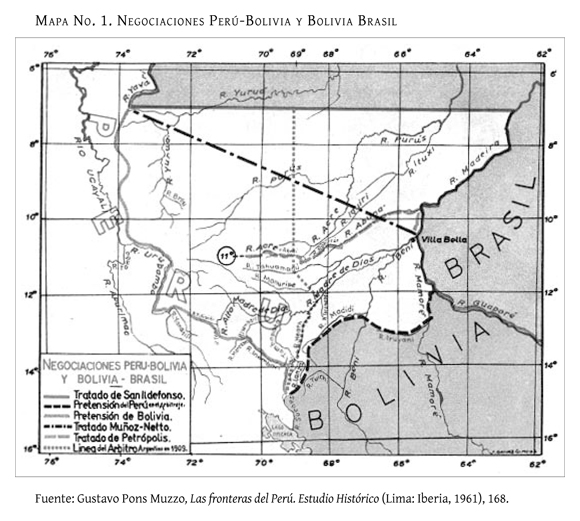 Negociaciones entre Perú-Bolivia y Brasil-Bolivia por la amazonia